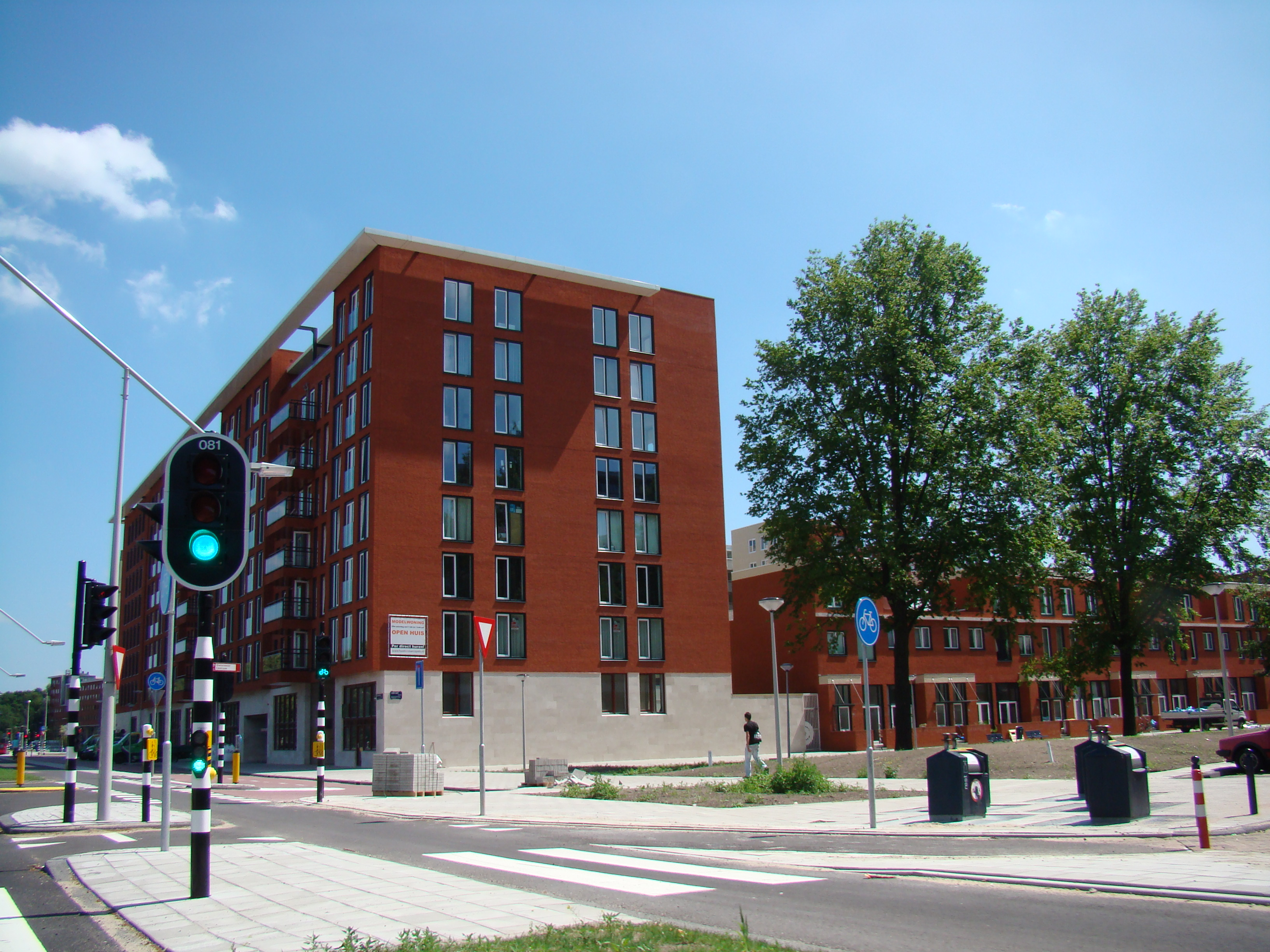 Impression of Osdorp (Netherlands) - Ookmeerweg hoek Geer Ban